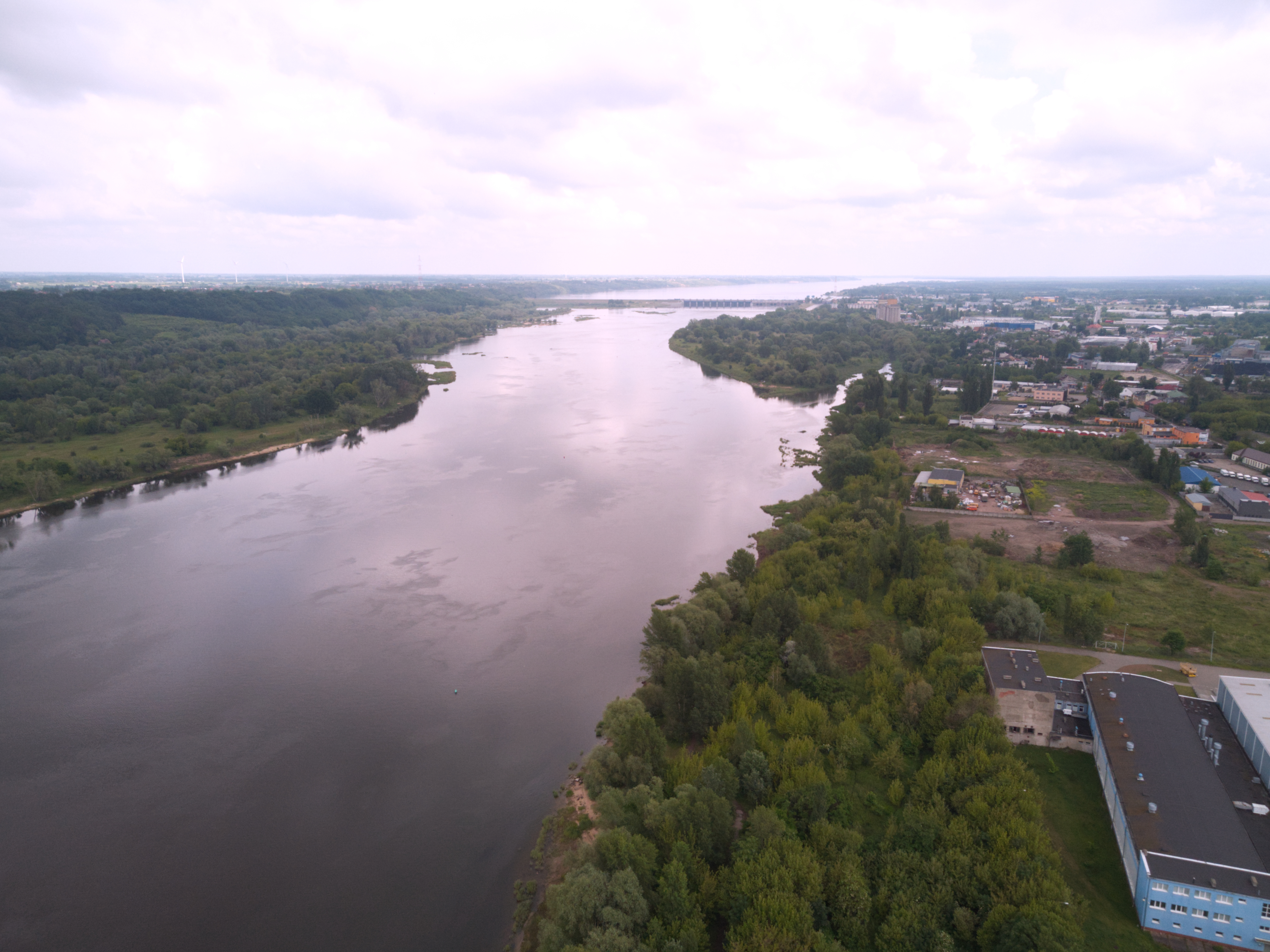 Wisła (2020 r.)